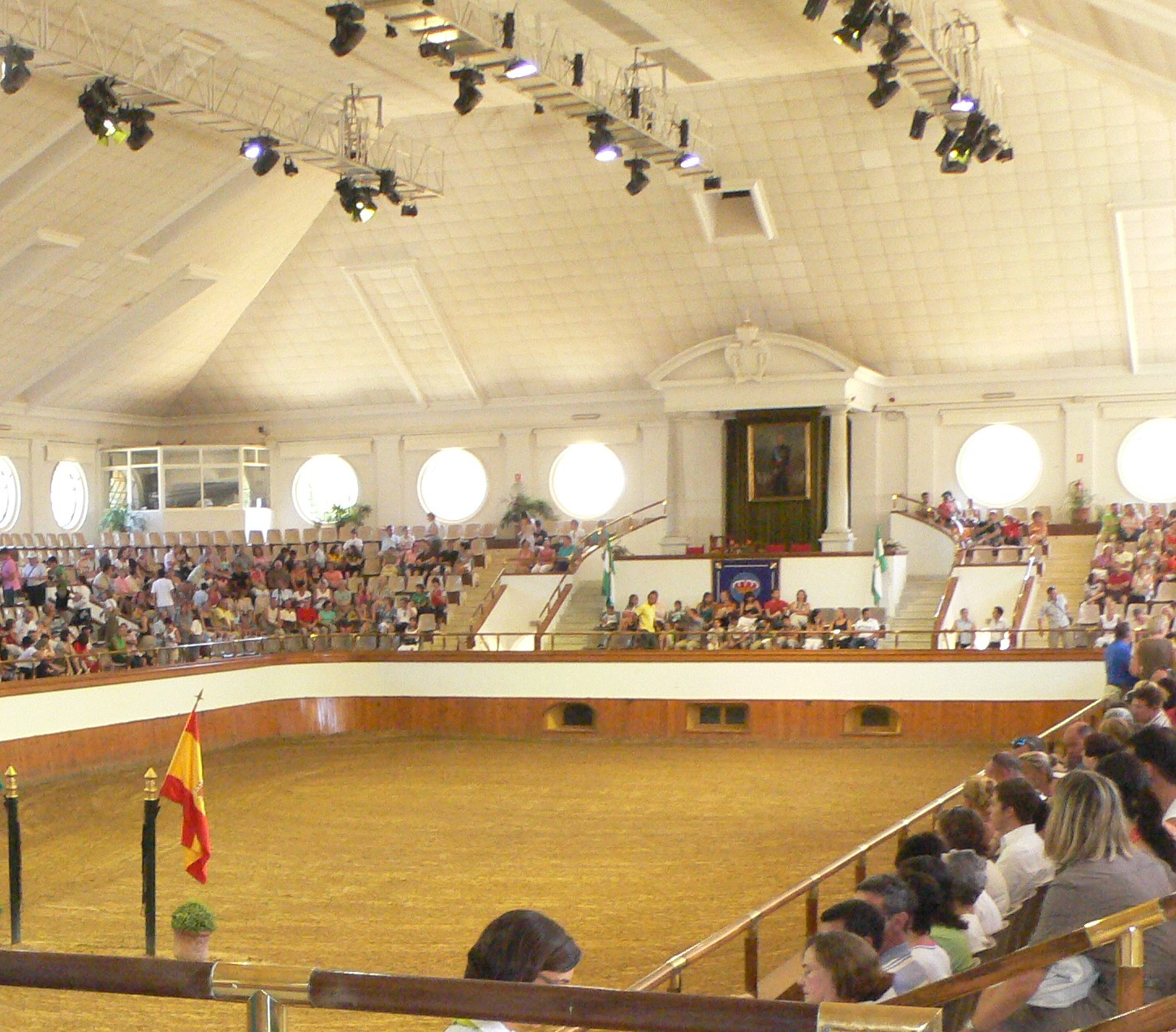 Palacio Duque de Abrantes, Jerez de la Frontera (Spain)